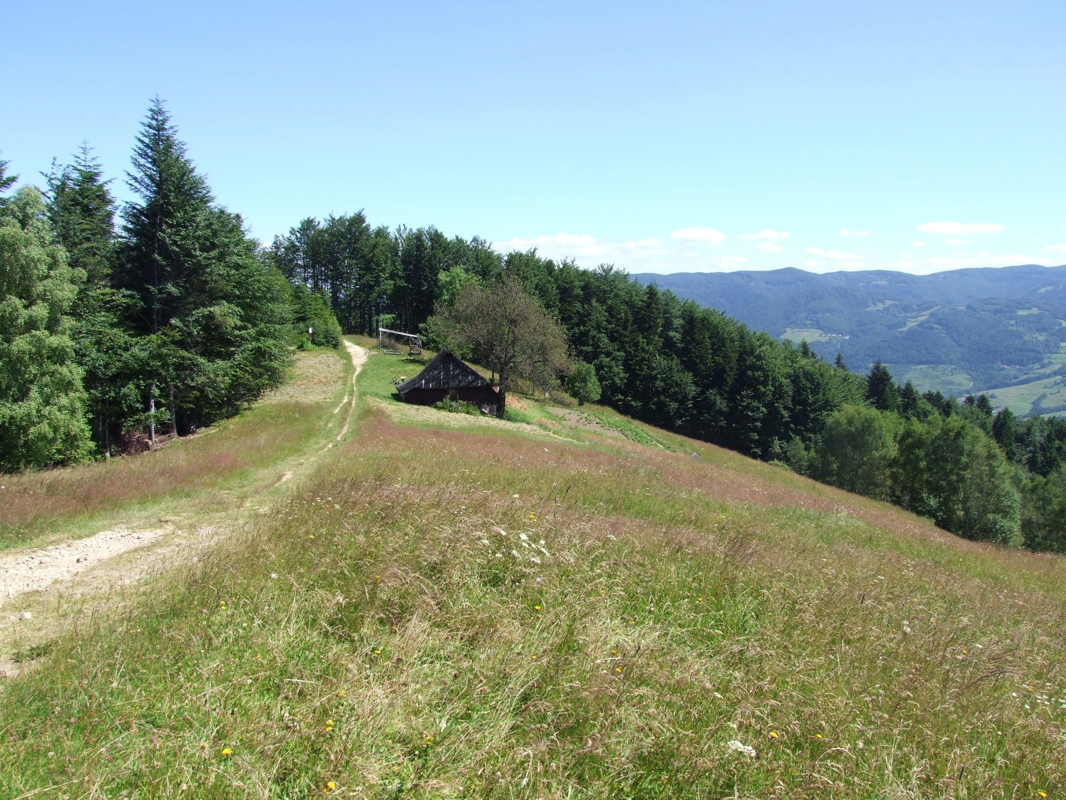 Polana Poczekaj na grzbiecie Kordowiec-Niemcowa w Paśmie Radziejowej. Dom babci Ludwiki Nowakowej